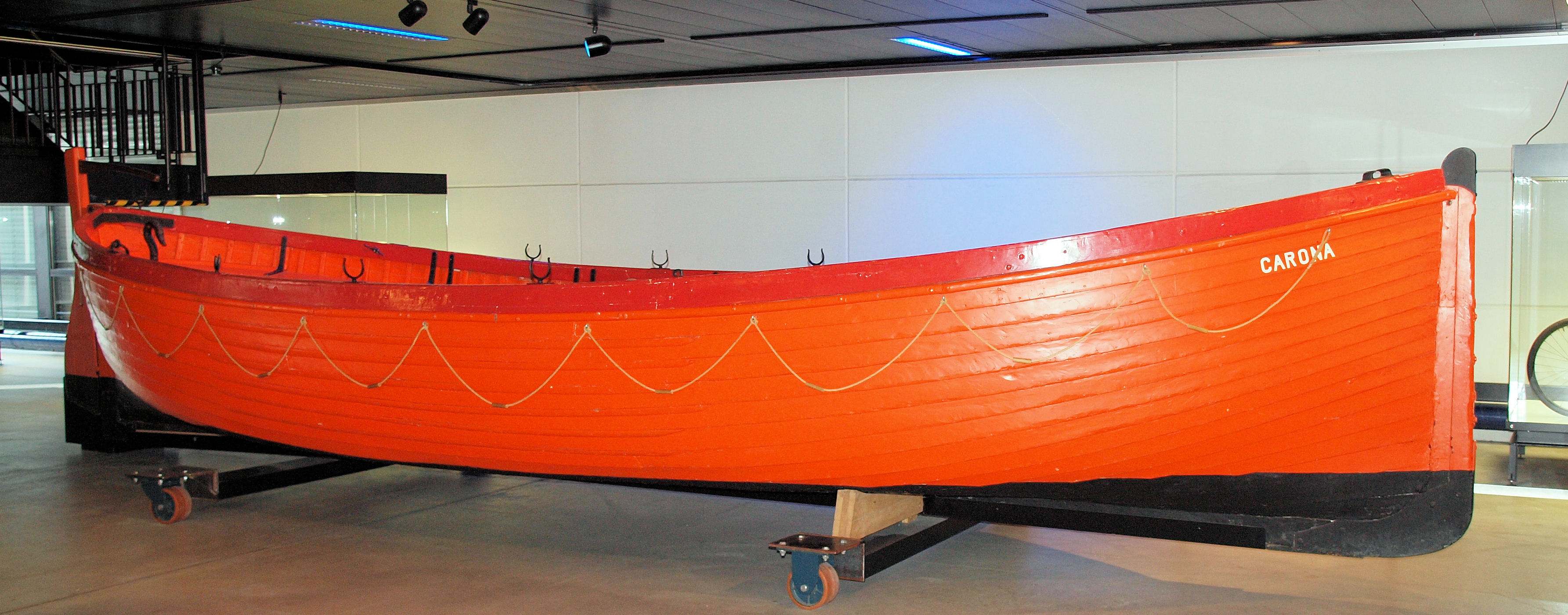 Das Rettungsboot des schweizer Frachters "Carona", der am 28. Februar 1964 vor Terschelling nach Kollision gesunken ist. Boot ist im Verkehrshaus der Schweiz ausgestellt.